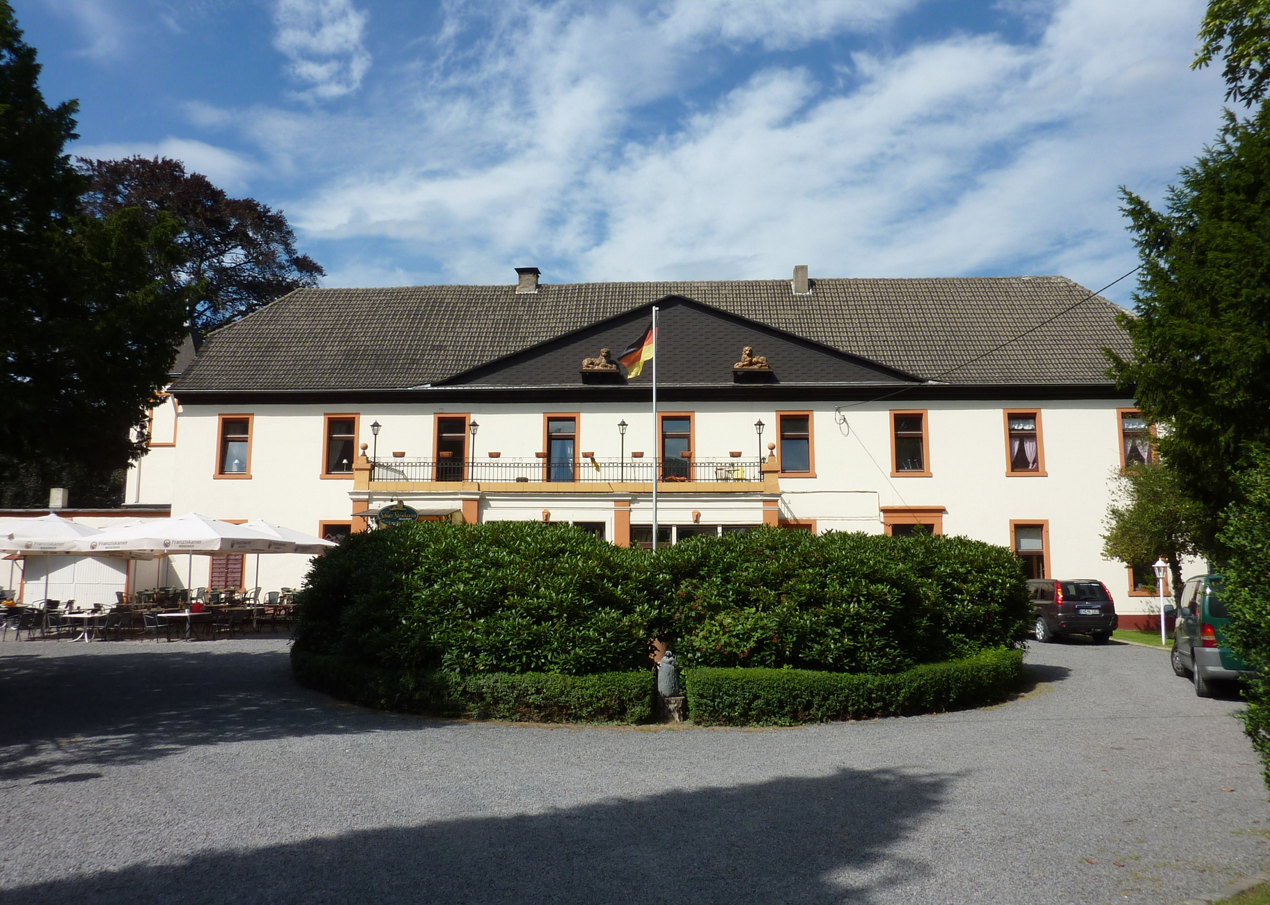 Schloss Steinhausen, WittenThis is a photograph of an architectural monument., no. 230